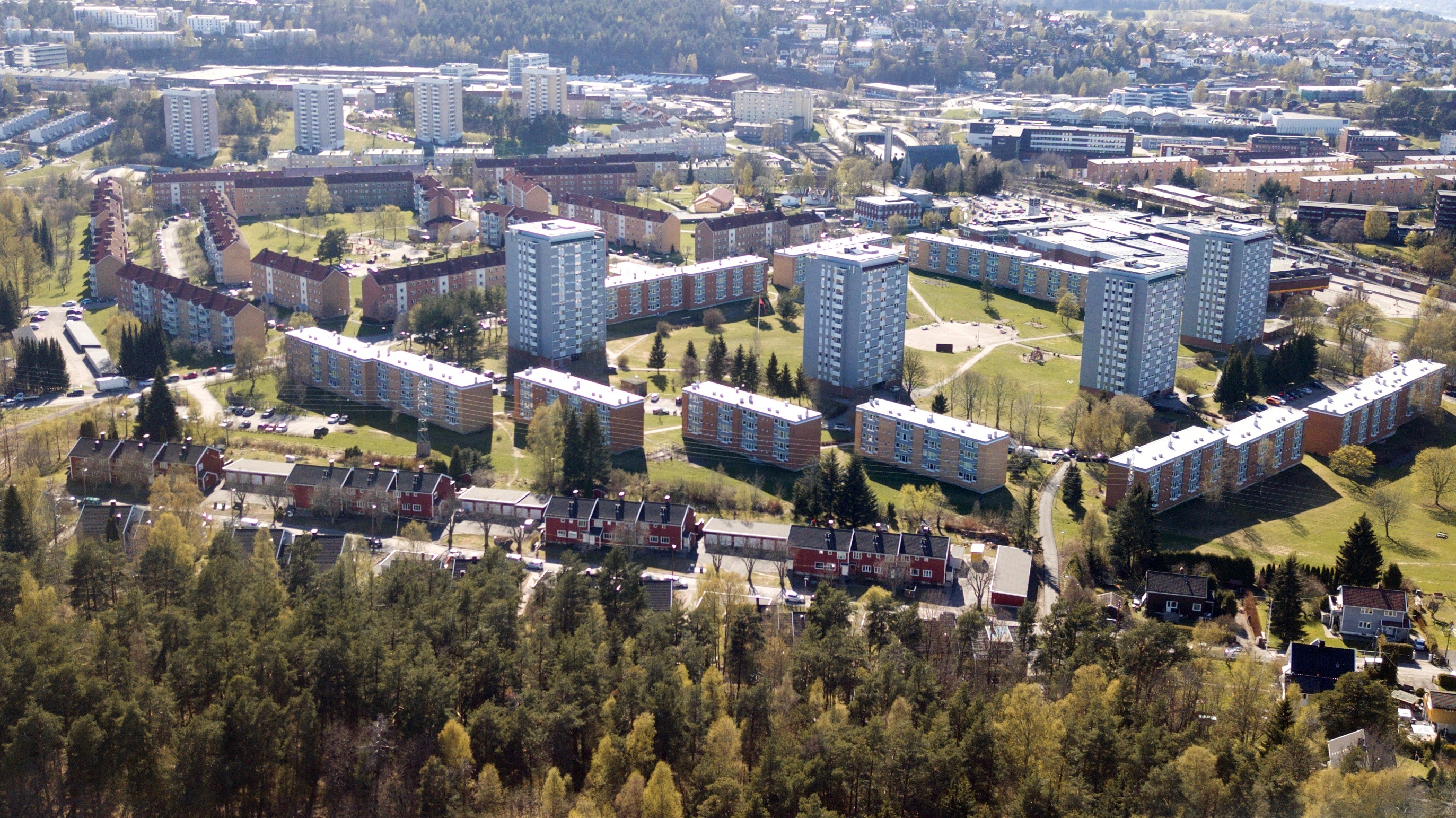 Wetlesens vei, Rugveien. Manglerud i Oslo.